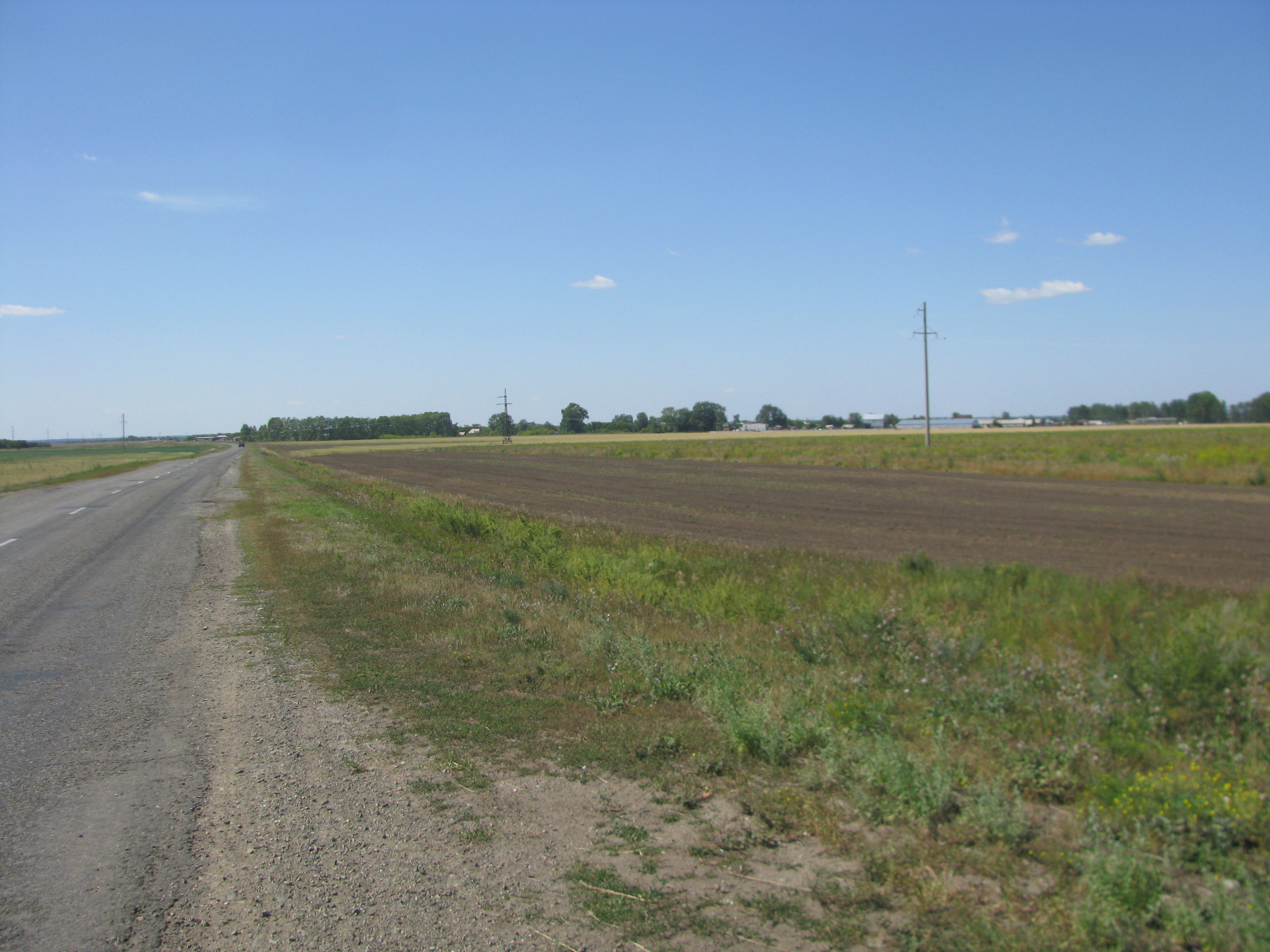 Вид на Боровское,Aleksandr stoljarov, собственная работа, август 2011г.